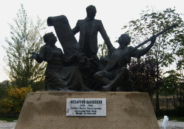 Ankara bulunan Muzaffer Sarısözen Anıtı